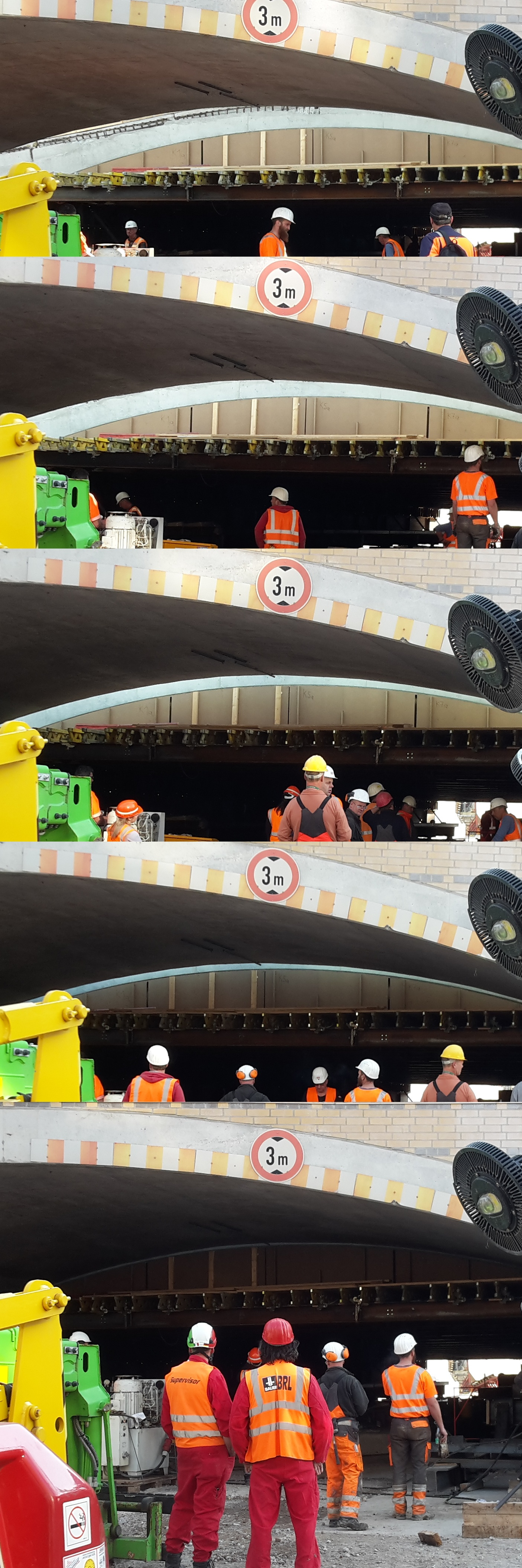 Die Bildsequenz zeigt die letzten Meter des Einschubs des ersten Segments der neuen Eisenbahnüberführung über die Königstrasse in Hannover am 7.4.2019. Hierfür musste der Zugverkehr am Hauptbahnhof Hannover größtenteils eingestellt werden. Das Segment wurde von hinten nach vorne geschoben, der im Vordergrund sichtbare Teil steht fest. Links neben den Bauarbeitern ist der Steuerstand sichtbar, mit dem die hydraulischen Zugvorrichtungen am linken und rechten Ende des Segmentes bedient wurden.